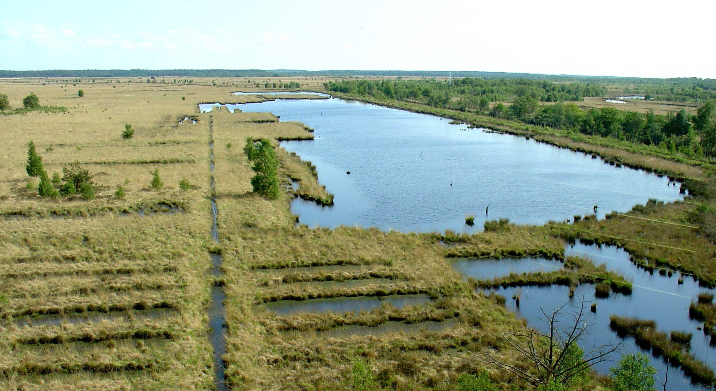 Het Fochtloërveen, hoogveengebied op de grens van Groningen en Friesland